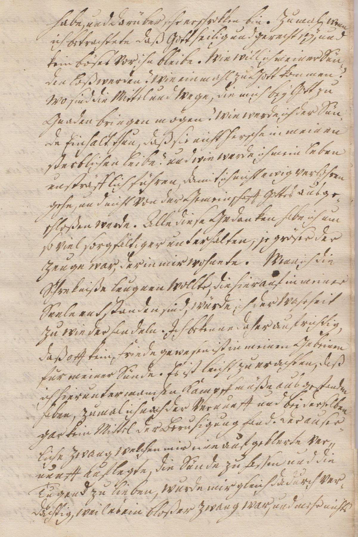 Seite 17 der Leichenpredigt für den Pastor August Wilhelm Reinhart (1696/1770), Bürger der Stadt Heringen an der Helme.